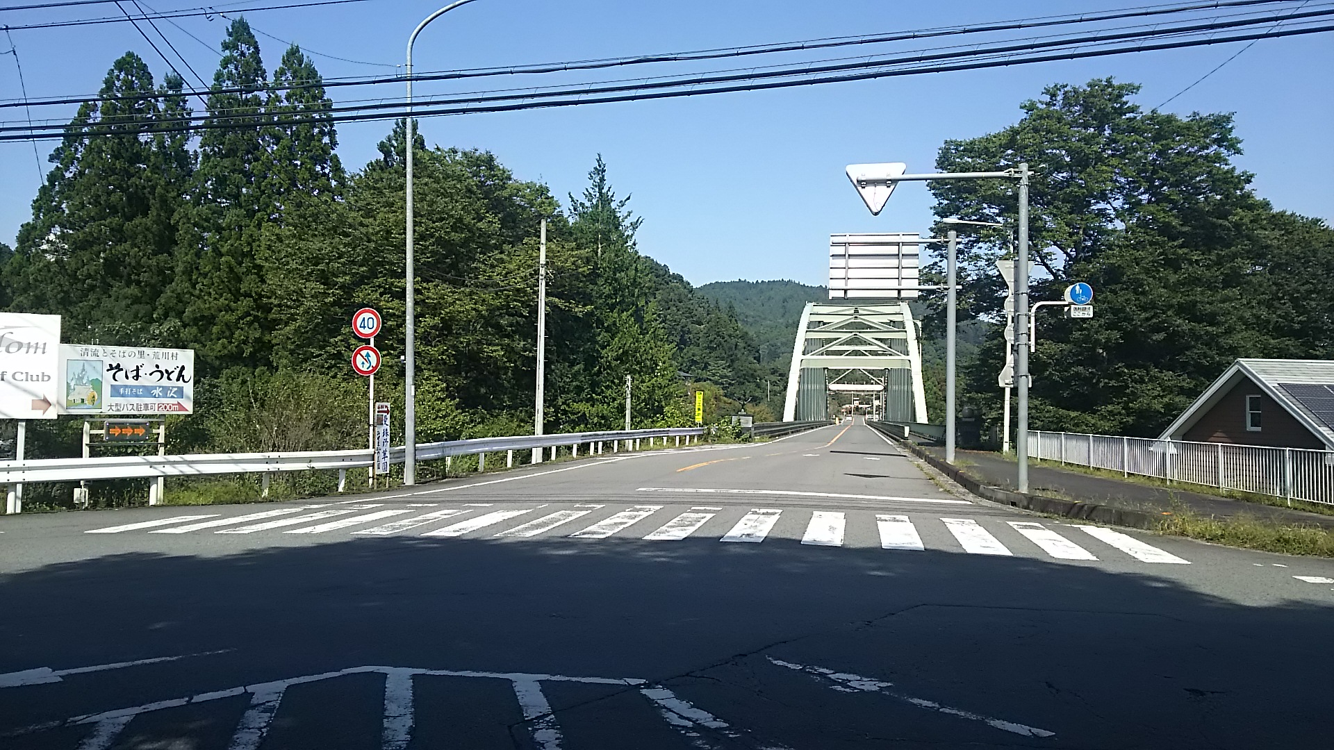 2019年9月撮影 秩父市荒川日野付近